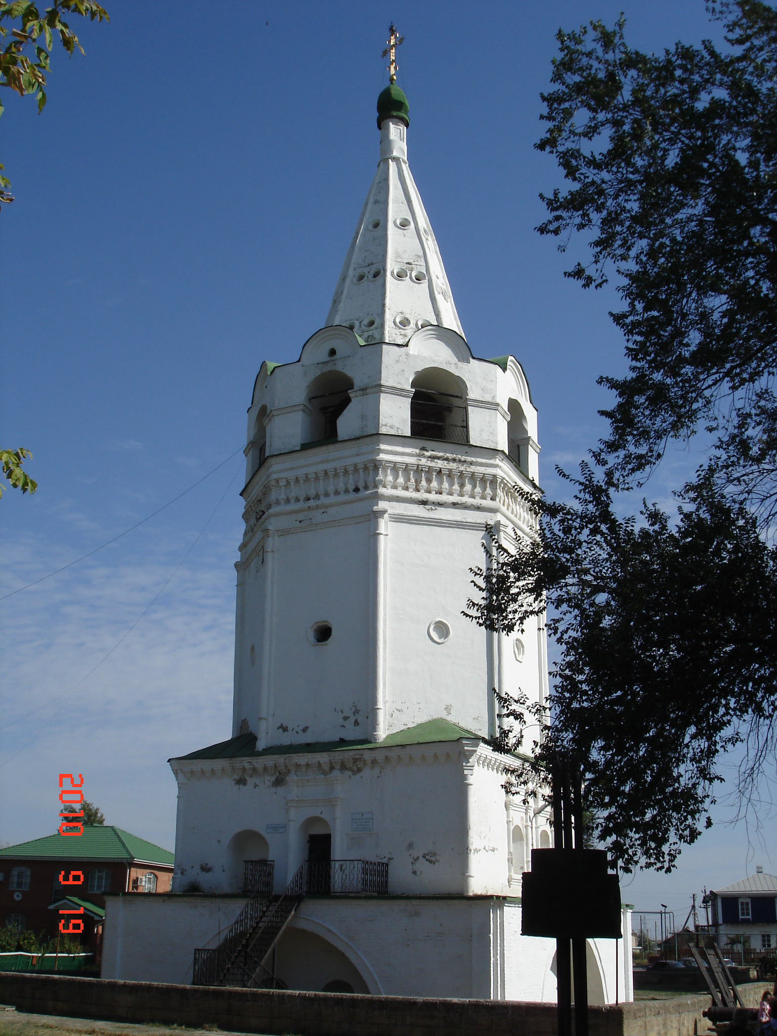 Старочеркасск - шатровая колокольня